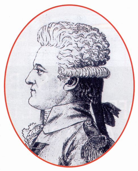 Amiral Villeneuve Portrait contemporain